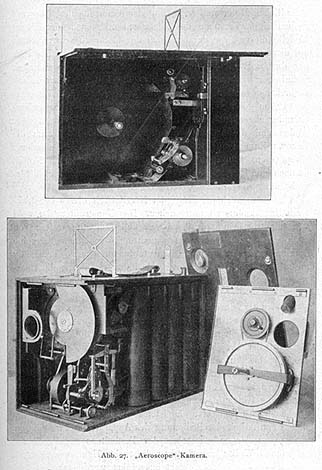 Аэроскоп